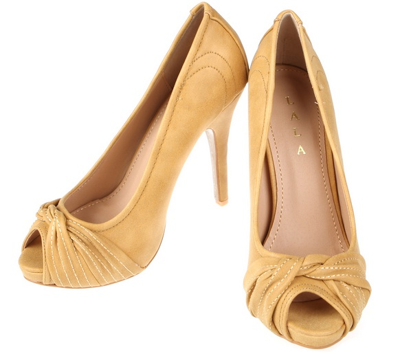 Pantofi dama cu platforma Lala sunt ideali pentru o seara de vara, o iesire in oras sau chiar participarea la un eveniment monden. Marca Lala este o marca italiana.